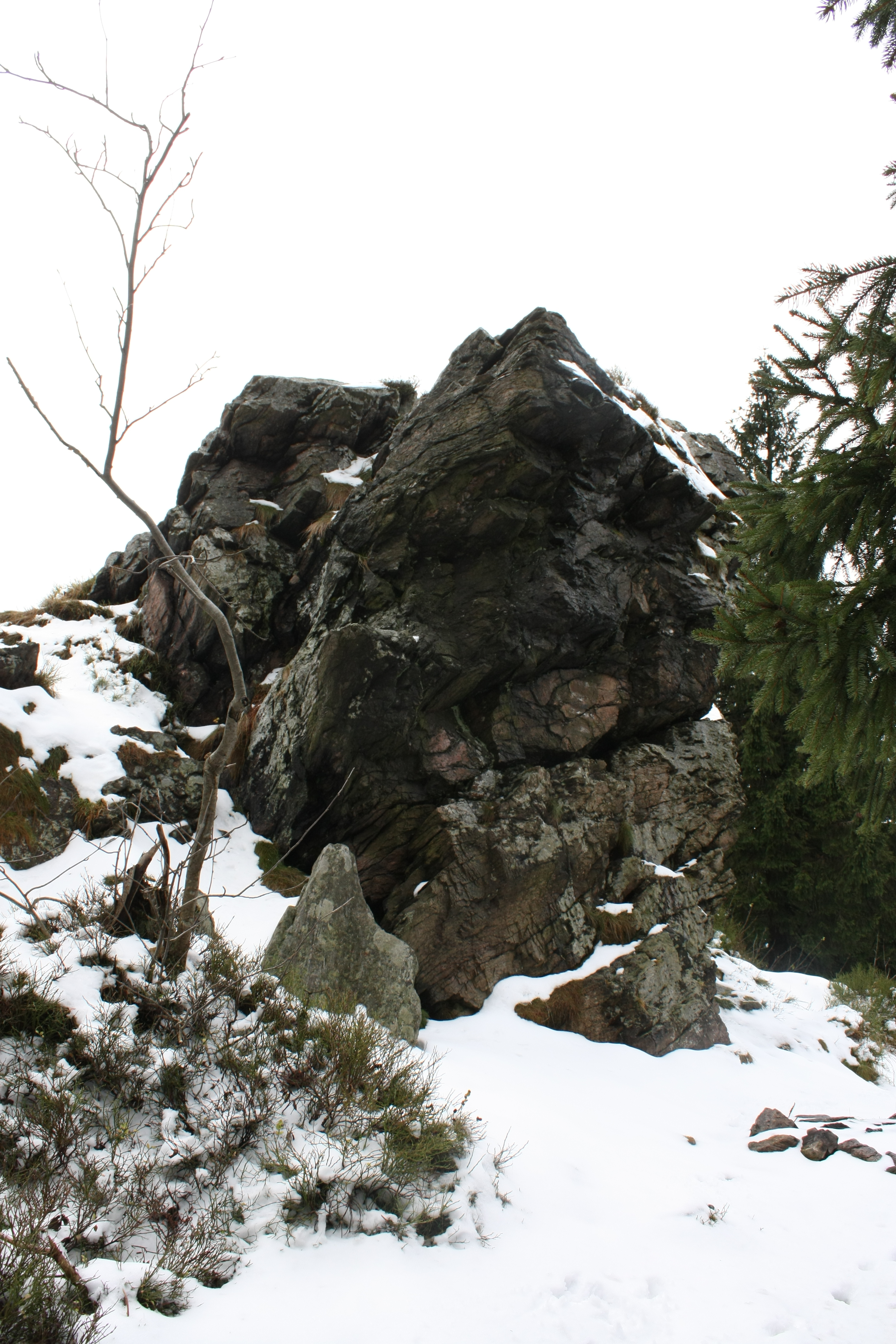 Orlické hory - Bradlo (983 m)